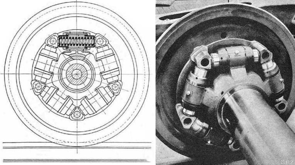 Beim MFO-Federtopfantrieb wirken die Federtöpfe nicht unmittelbar auf die Radspeichen, sondern auf einen auf die Radnabe aufgezogenen Mitnehmerstern. Das hat den Vorteil, dass normale Radsätze mit Massivscheiben in Leichtbauart verwendet werden können und erlaubt eine selbsttätige Schmierung zwischen den Federtöpfen und ihren Lagerbüchsen sowie zwischen den Federtöpfen und den Mitnehmerarmen. Der Antrieb wurde das erstmals beim Dreifachtriebwagenzug Re 8/12 501 der SBB eingesetzt.